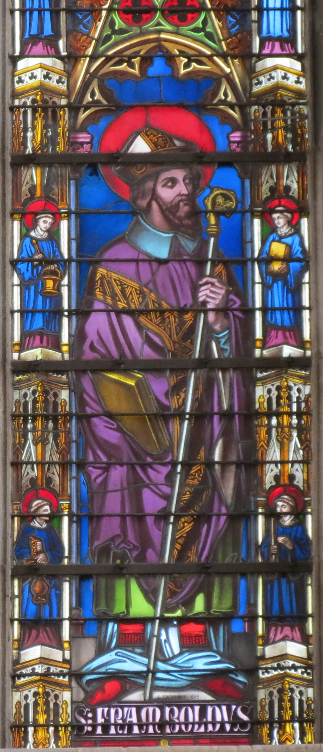 Détail du vitrail du transept nord de 1848 de Thevenot représentant Saint-Frambold, évêque de Bayeux.